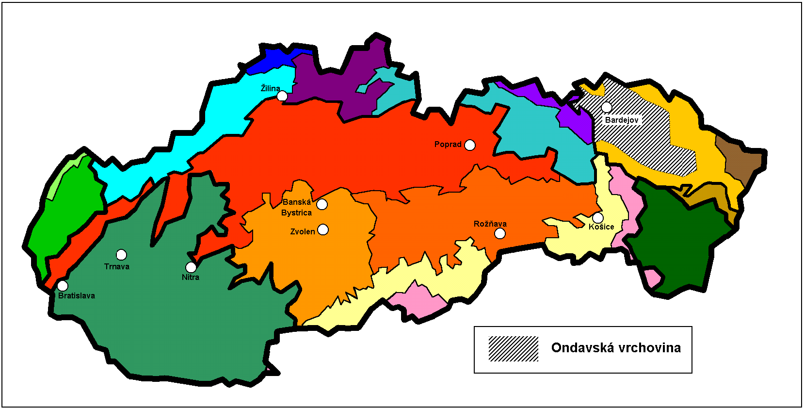 Ondavska vrchovina